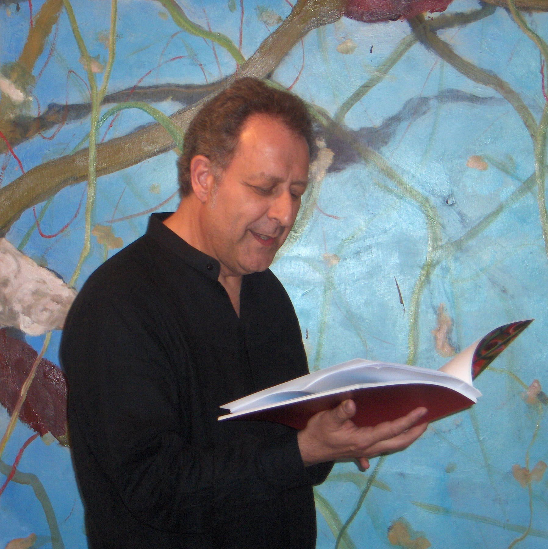 Zéno Bianu, photo de Chantal Messagier.